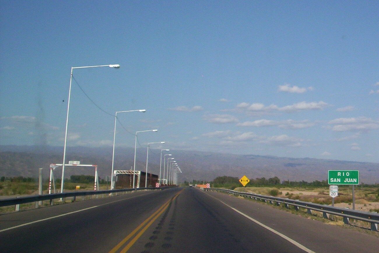 Fotografía de la Ruta Nacional 20 a la altura del Río San Juan, departamento 9 de Julio, provincia San Juan Argentina